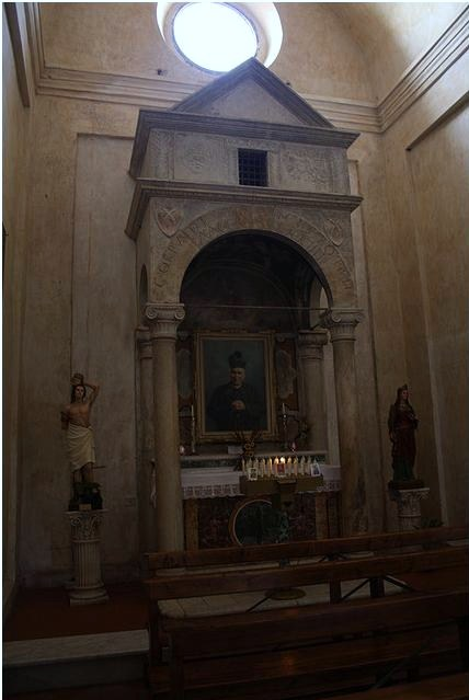 ceri, frazione di Cerveteri: interno del santuario di Santa Maria Immacolata.